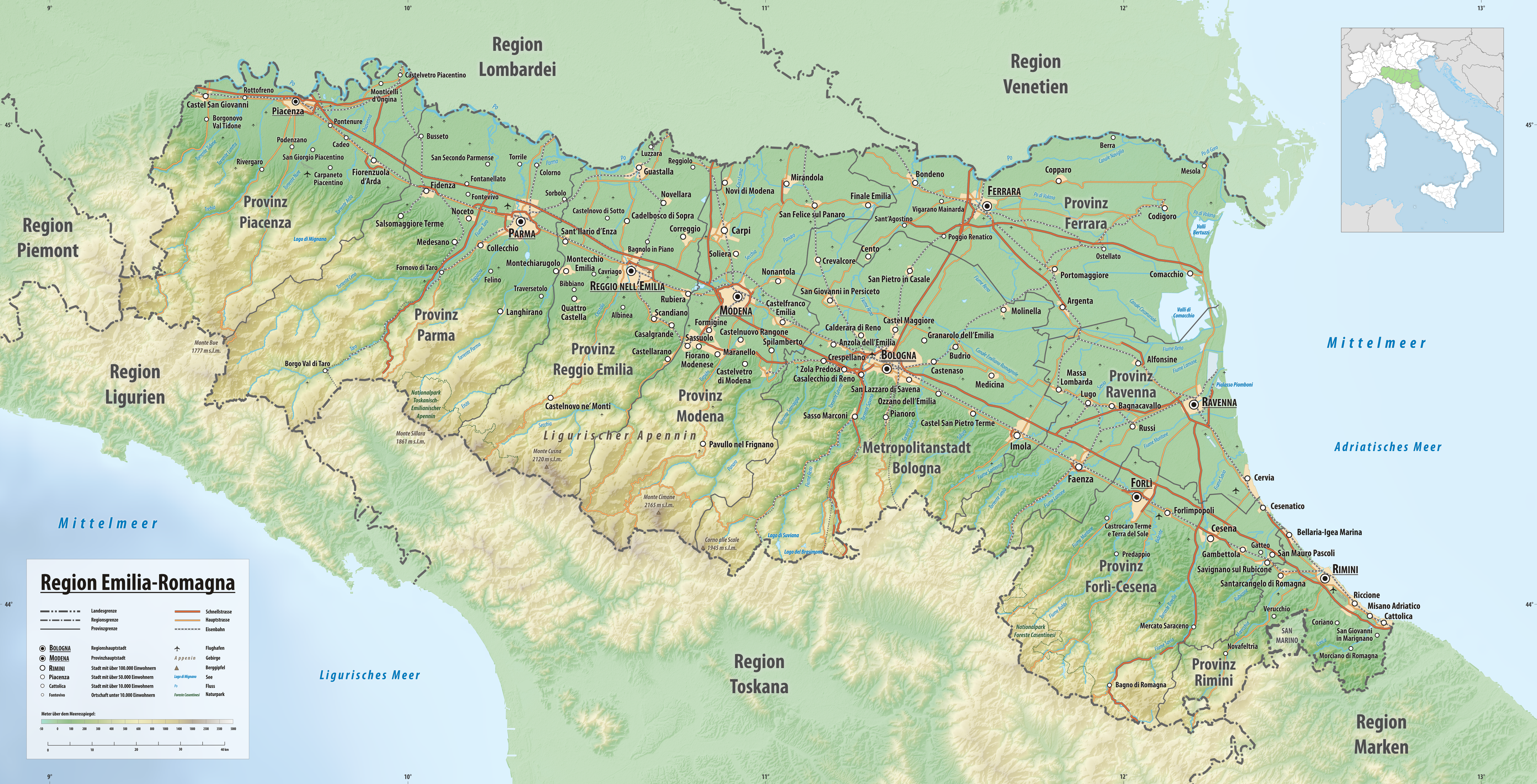 Reliefkarte der Region Emilia-Romagna Topographischer Hintergrund: NASA Shuttle Radar Topography Mission (public domain). SRTM3 v.2.